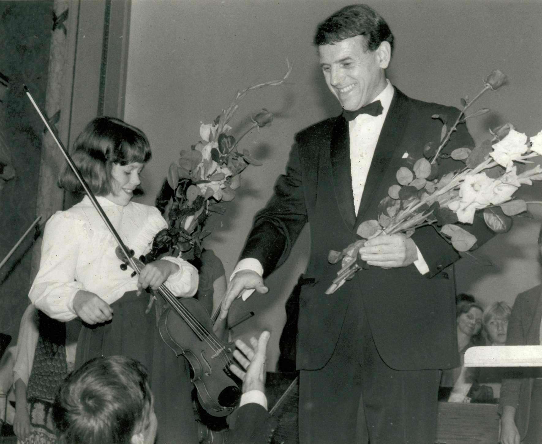 Den norske fiolinisten Elise Båtnes (her 12 år) og hennes fiolinlærer - og daværende rektor ved Trondheim kommunale musikkskole, Kåre Opdal. Bildet er fra Trondheim kommunale musikkskoles 10-års jubileumskonsert i Frimurerlogen, 3. september 1983. Kåre Opdal dirigerte et sammensatt orkester av Viderekomne elever, studenter fra Trøndelag musikkonservatorium, lærere fra TKM og Elise Båtnes som solist i M. Bruchs konsert for fiolin og orkester i g-moll.